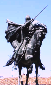 Estatua ecuestre del Cid en Burgos